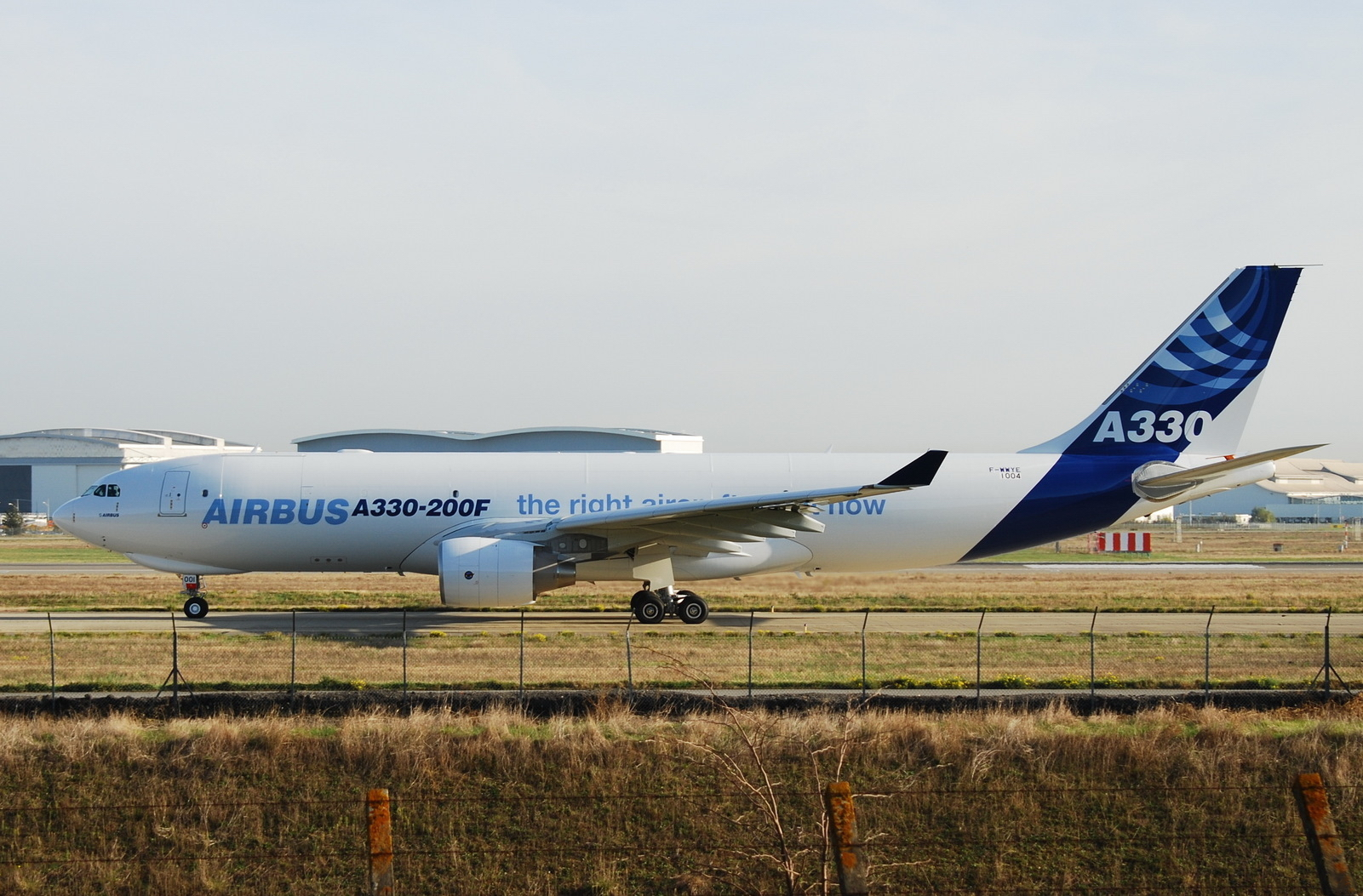 Photo prise à l'aéroport de Toulouse-Blagnac (LFBO) en France. Picture take at Toulouse-Blagnac Airport (LFBO) in France.